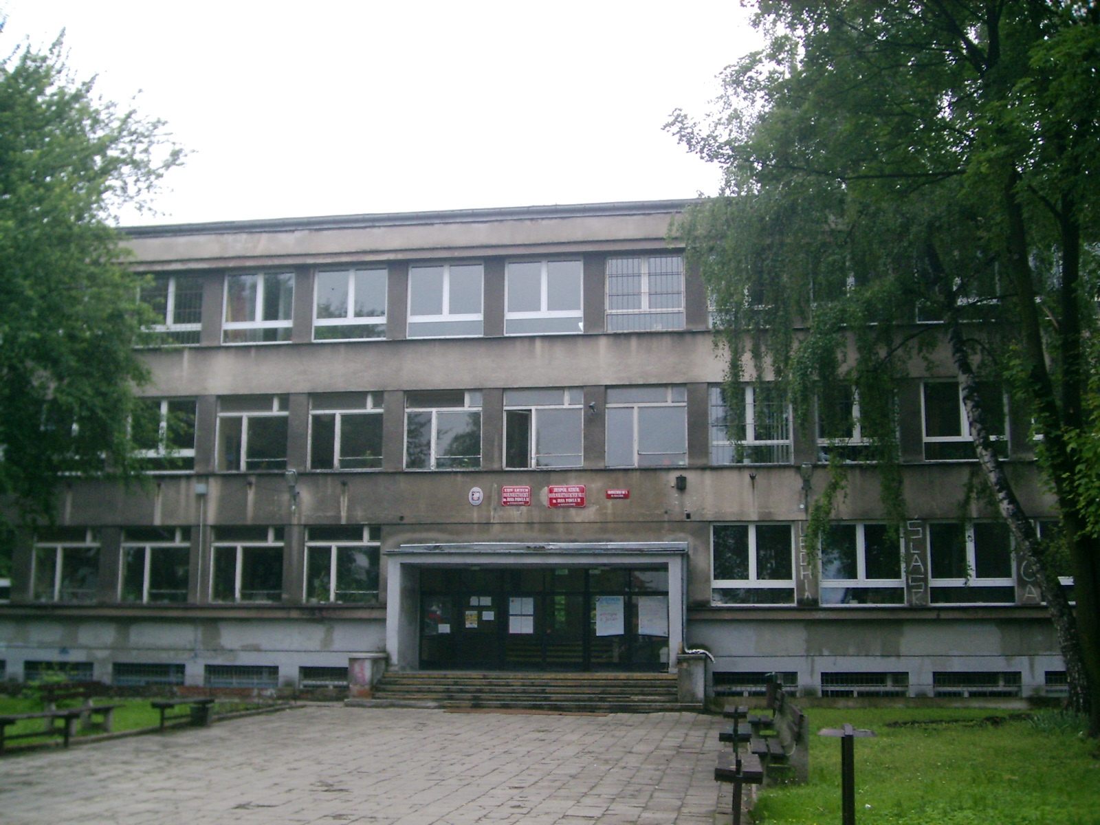 Liceum nr 24, Olsza, Kraków